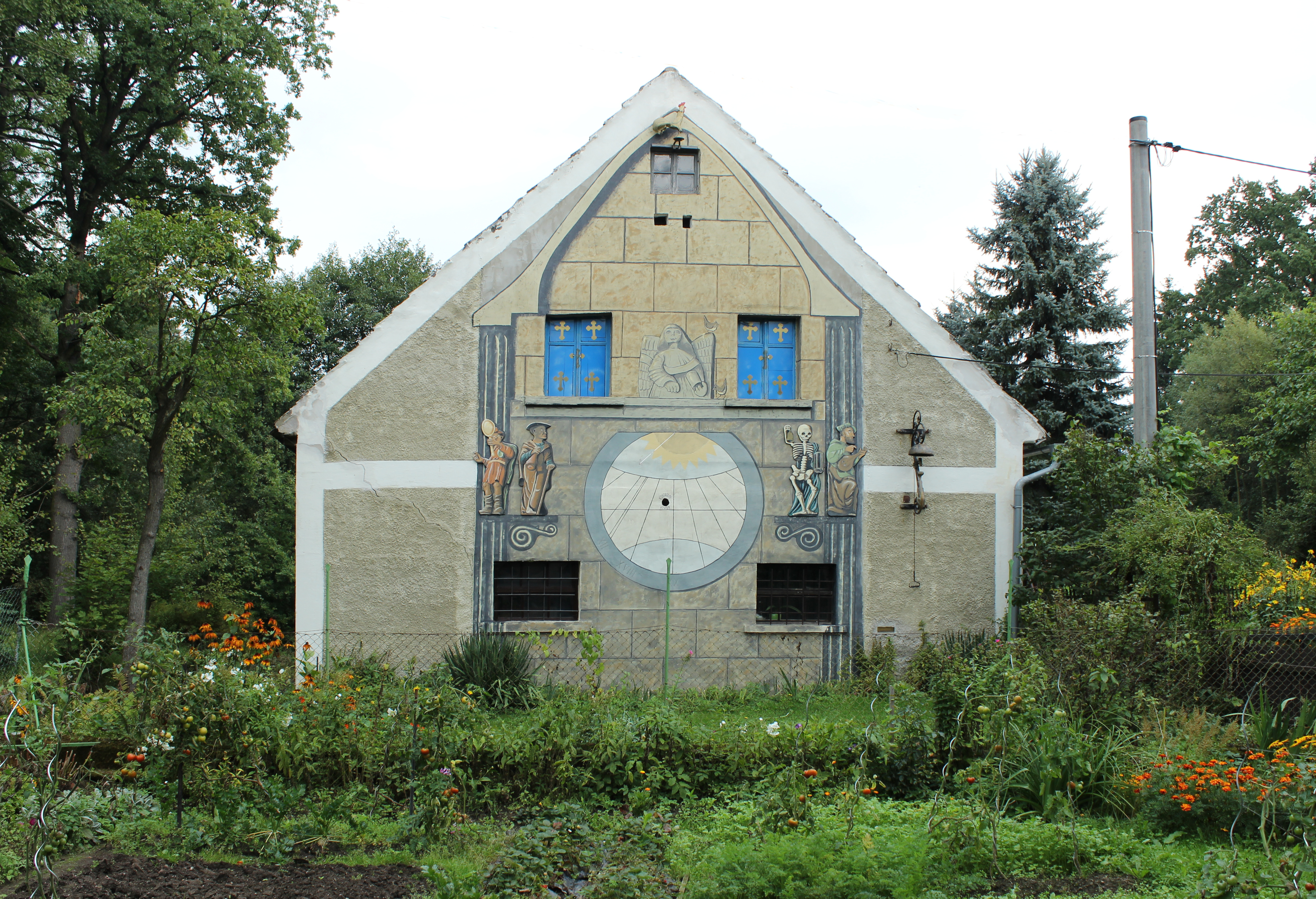 Pohled na stodolu u domu číslo popisné 14 v Krásném Lese v libereckém okrese, která je zbarvena do podoby orloje.